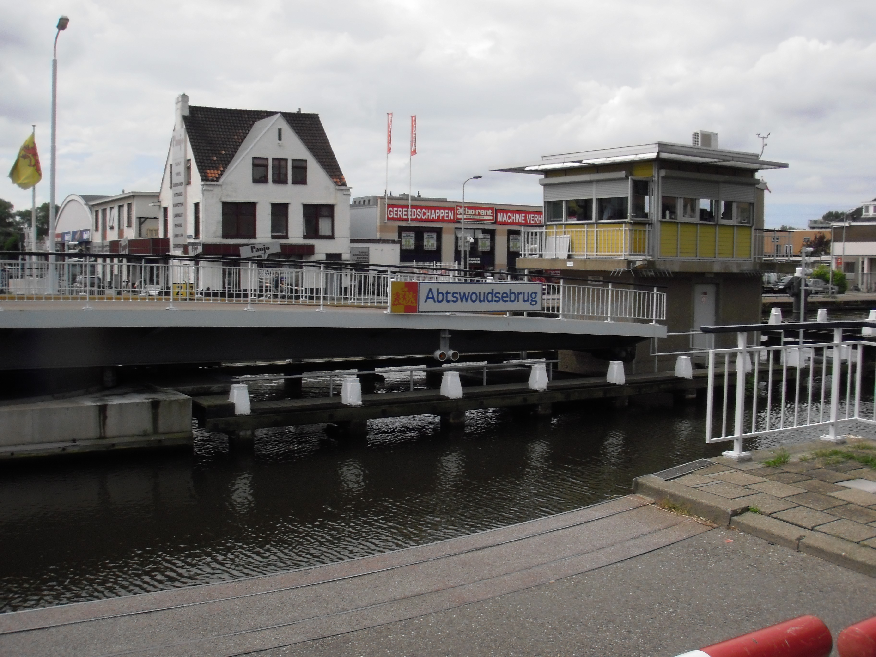 De Abtwoudsebrug geopend in Delft.